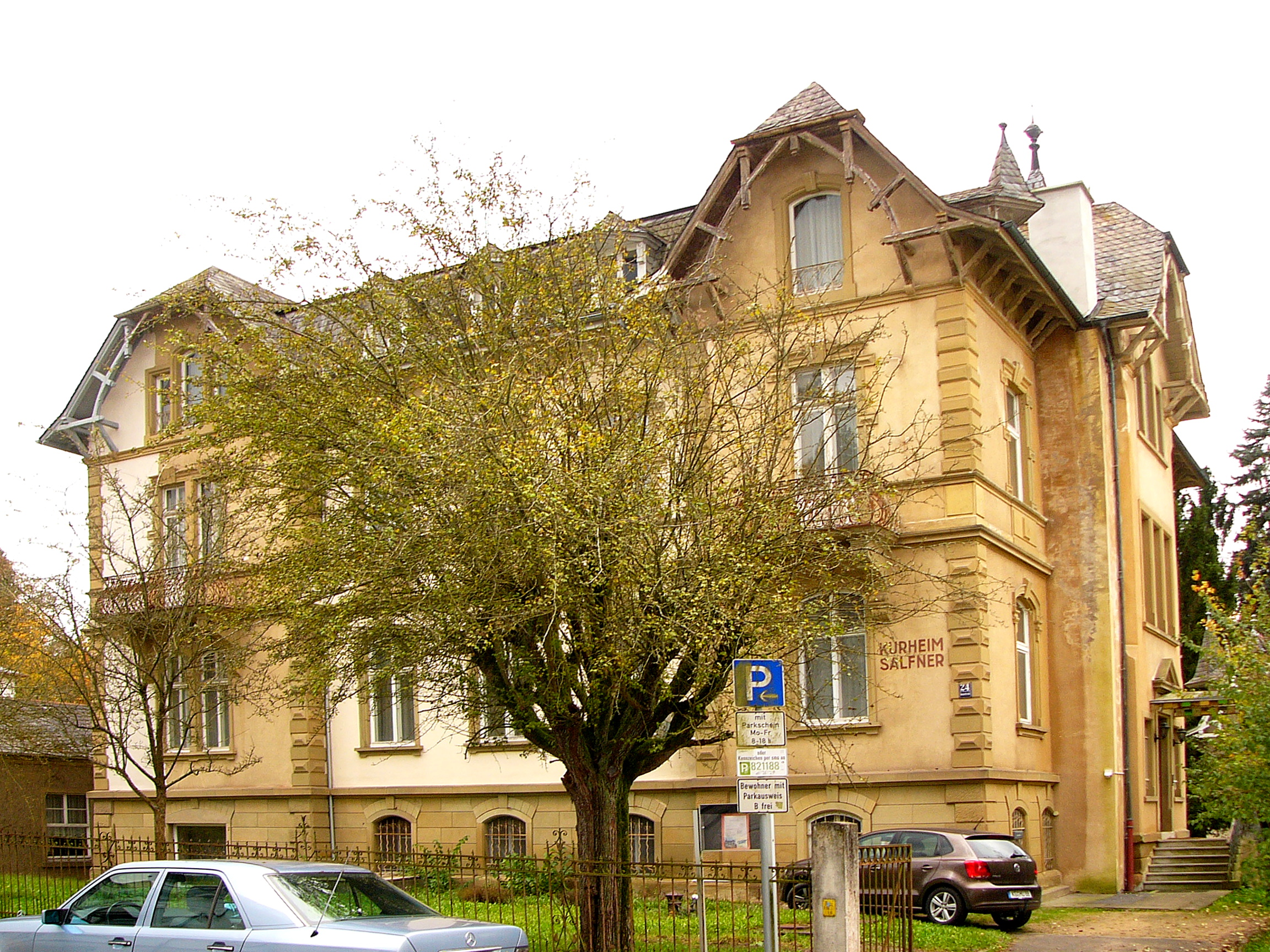 Kurvilla; dreigeschossiger Massivbau mit Krüppelwalmdächern mit Schwebegiebeln, Sandsteingliederung, sowie nordöstlichem Turm mit Spitzhelm, im Schweizerhausstil, um 1890, mit südlichem, eingeschossigen Satteldachanbau mit Verbindungssteg, wohl um 1905.This is a photograph of an architectural monument.